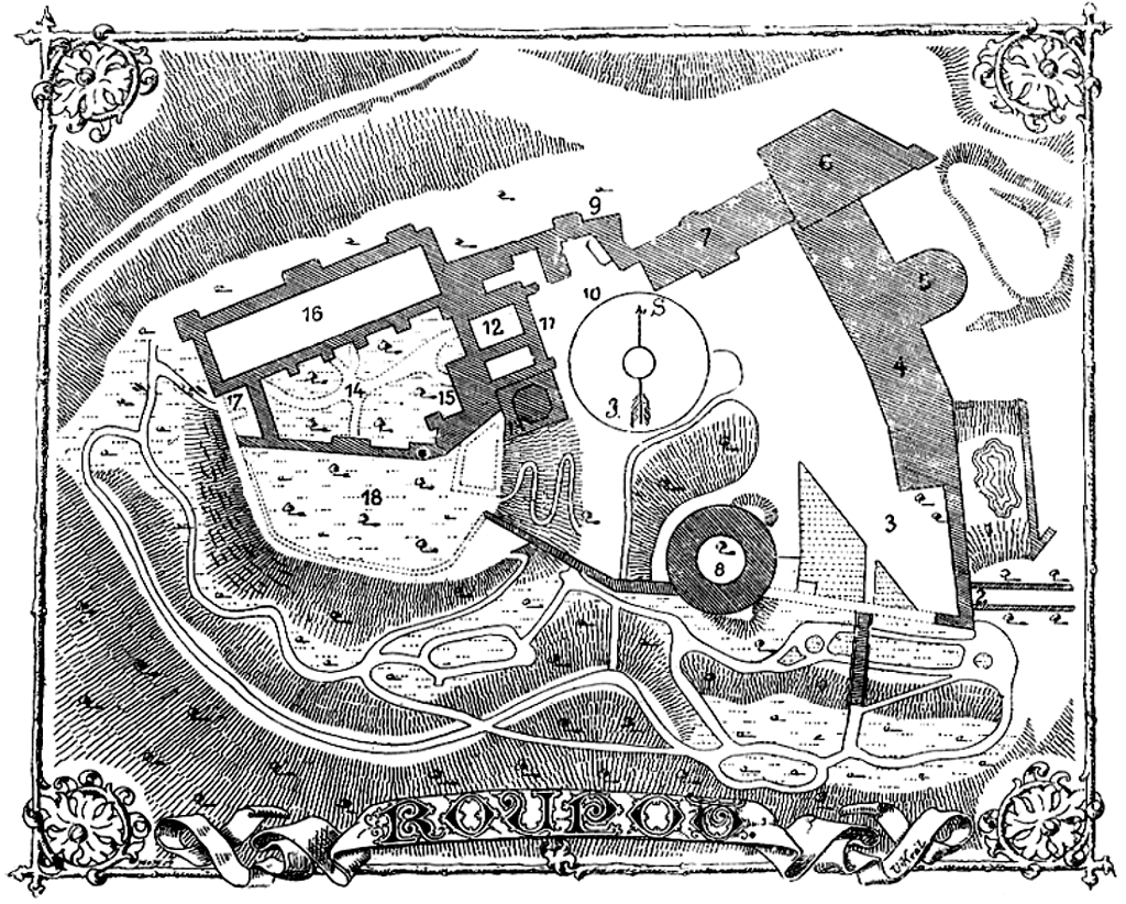 Roupov – půdorys hradu od Vojtěcha Krále z Dobré Vody publikovaný roku 1893; Popis: 1 – příkop, 2 – první brána, 3 – předhradí, 4 – hospodářská budova, 5 – bašta, 6 – věžovitá budova, 7 – novodobě upravená budova, 8 – velká věž, 9 – hradba, 10 – zasypaný příkop, 11 – druhá brána, 12 – průjezd, 13 – kuchyně, 14 – nádvoří hradního jádra, 15 – studna, 16 – palác, 17 – zřícené křídlo (věžový palác)